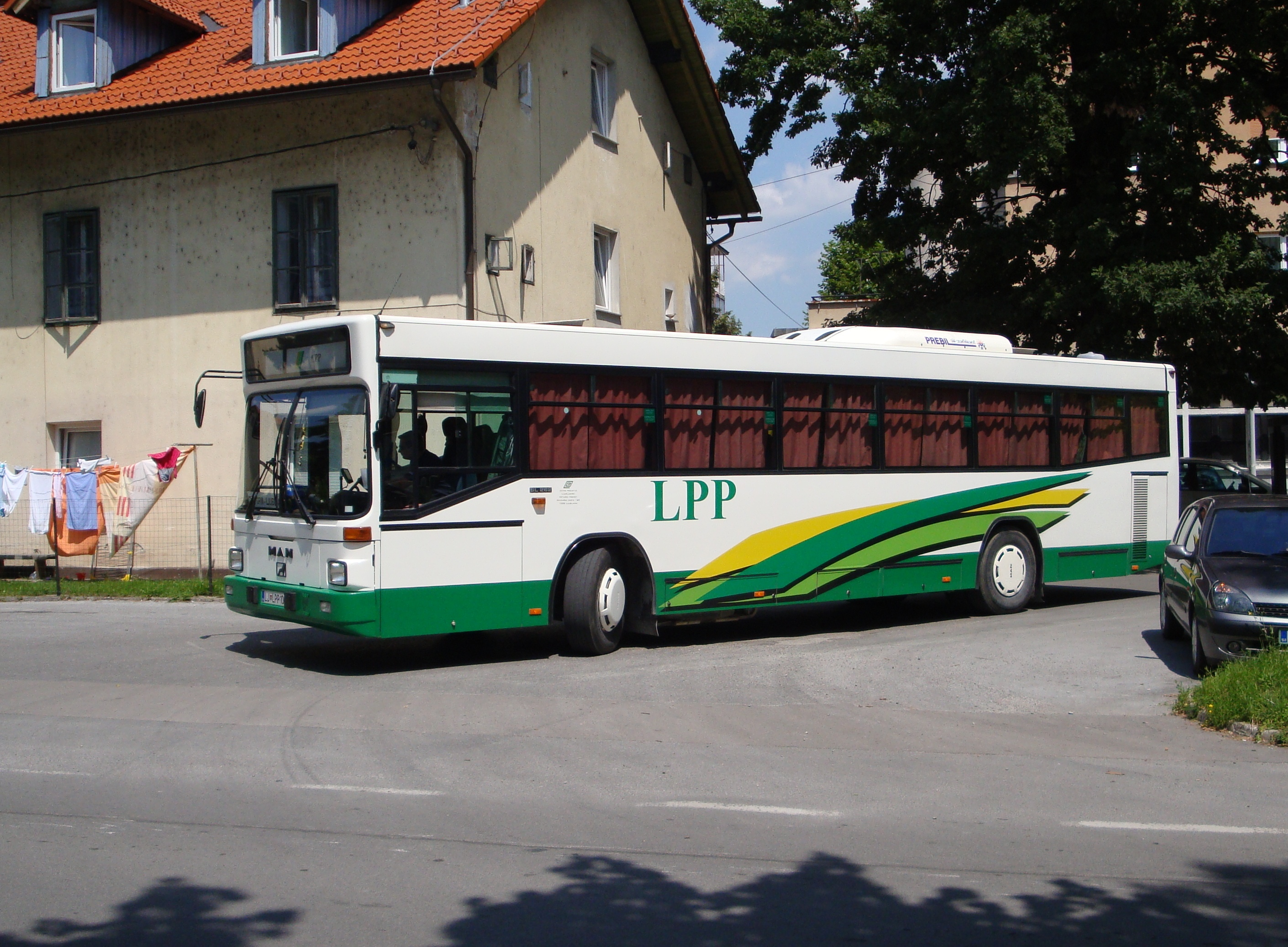 Avtobus na Vevčah